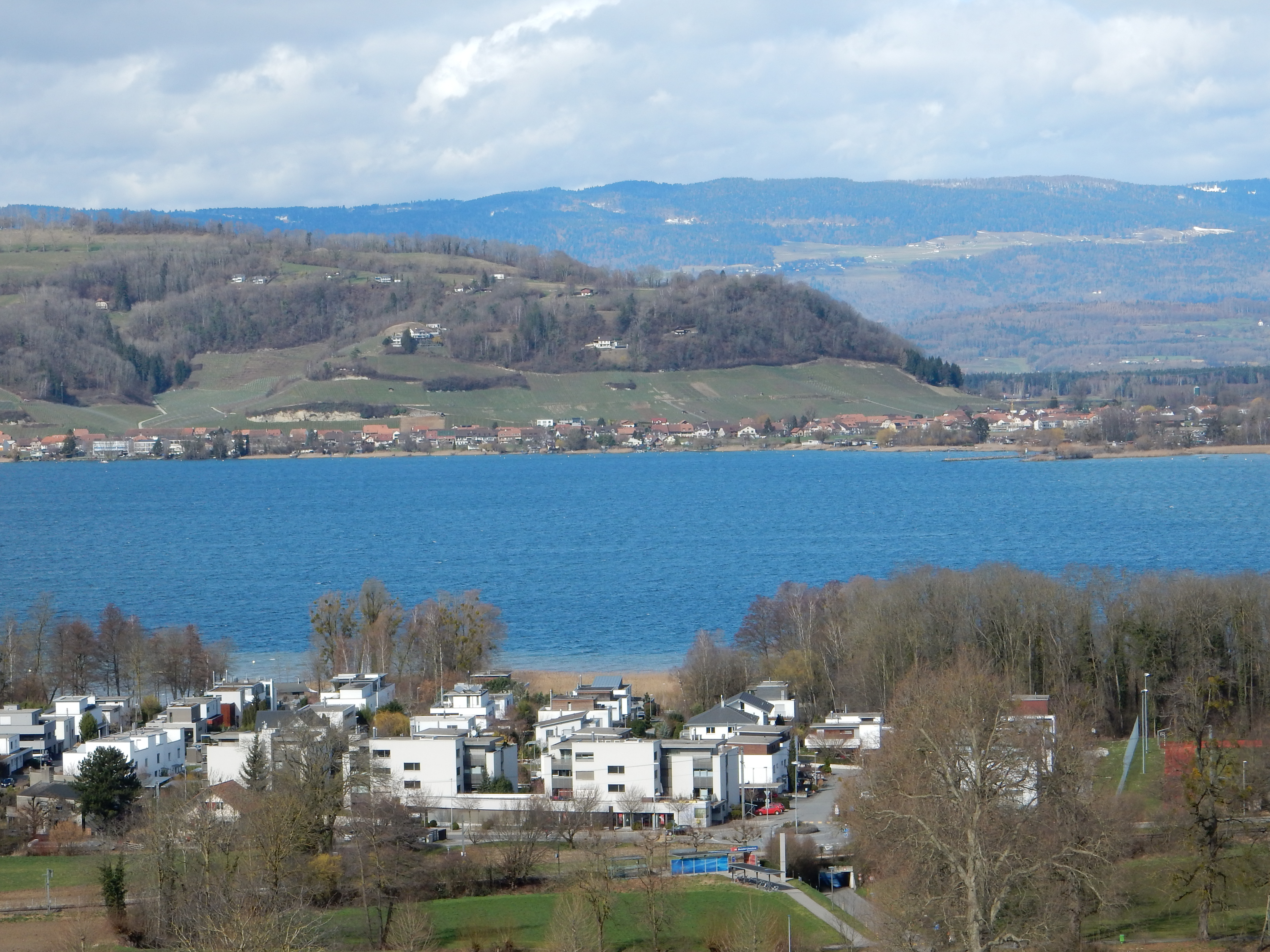 Am Murtensee: im Vordergrund Muntelier, am hinteren Ufer Sugiez und der Mont Vully, im Hintergrund der Jura